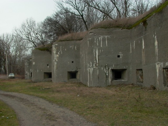 Czarnowo - tradytor artyleryjski w dziele pośrednim D-8 Twierdzy Modlin.